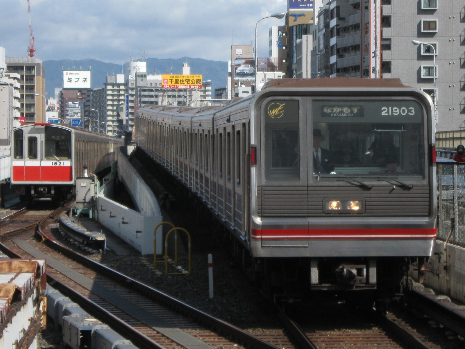 大阪市交通局10系1121F（左）･21系21603F（右） 御堂筋線新大阪駅にて撮影。